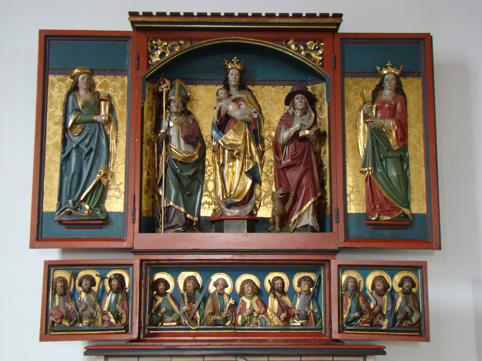 Muttergottesaltar der Mauritiuskirche in Oedheim